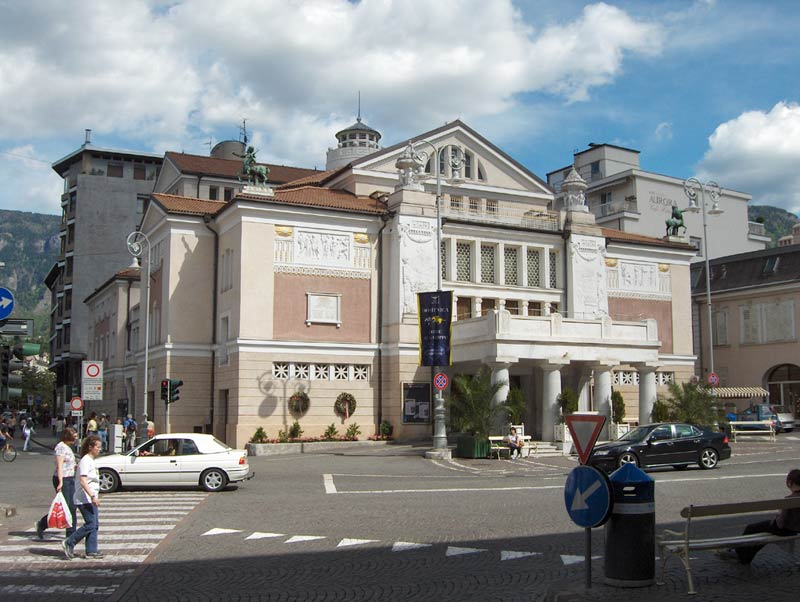 Stadttheater von Meran, 1899 von Martin Dülfer gebaut.